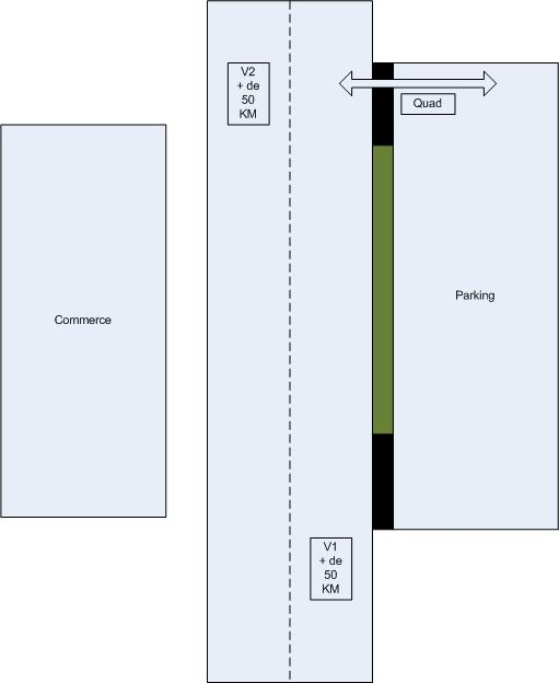 un parking